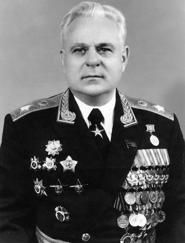 Генерал армии Ивановский Евгений Филиппович